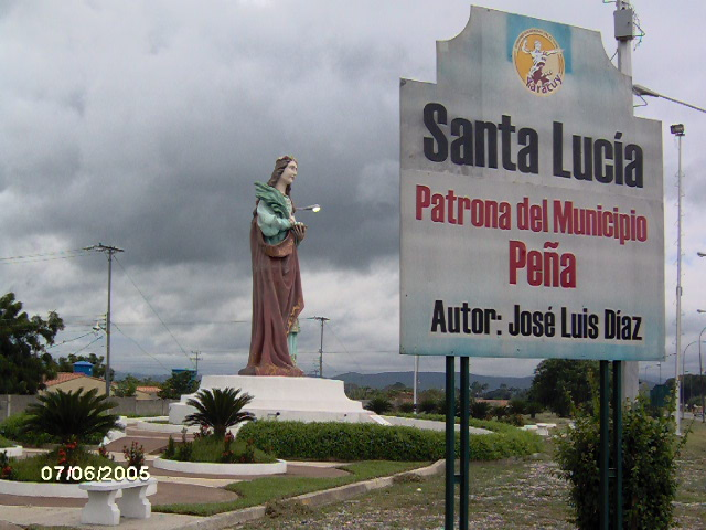 Monumento Santa Lucía.